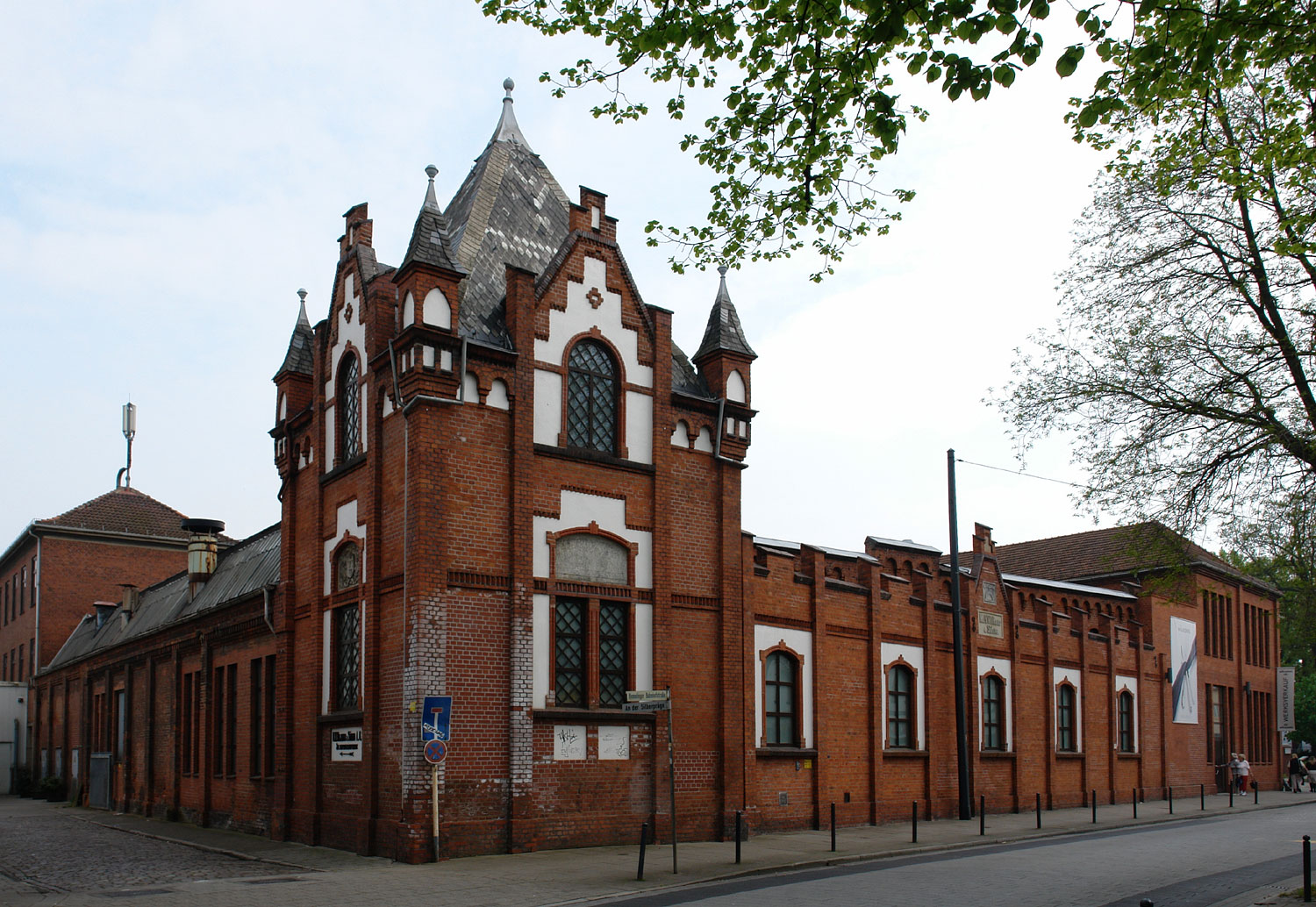 Altes Fabrikgebäude der Firma Wilkens & Söhne in Hemelingen